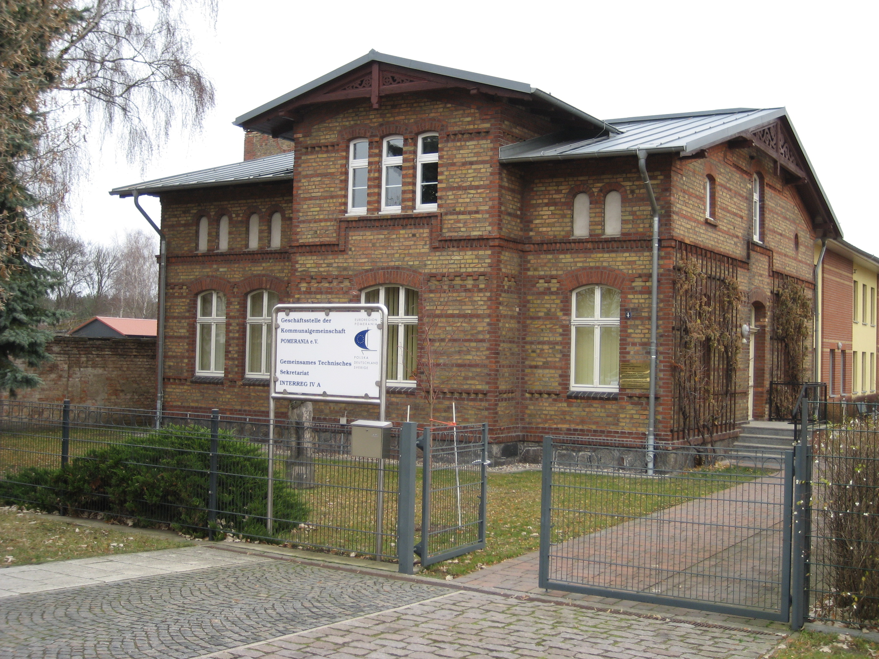 Gebäude der Kommunalgemeinschaft "Europaregion Pomerania" in der Ernst-Thälmann-Straße 4 am 29. November 2013.